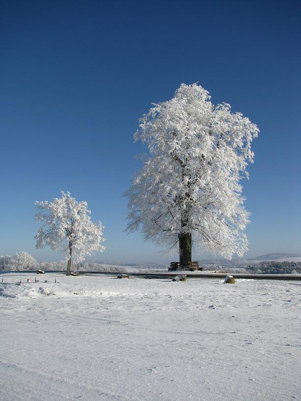 Schneebedeckte Pfarrlinde mit Schwesterlinde auf dem Pfarrberg in Frankenthal